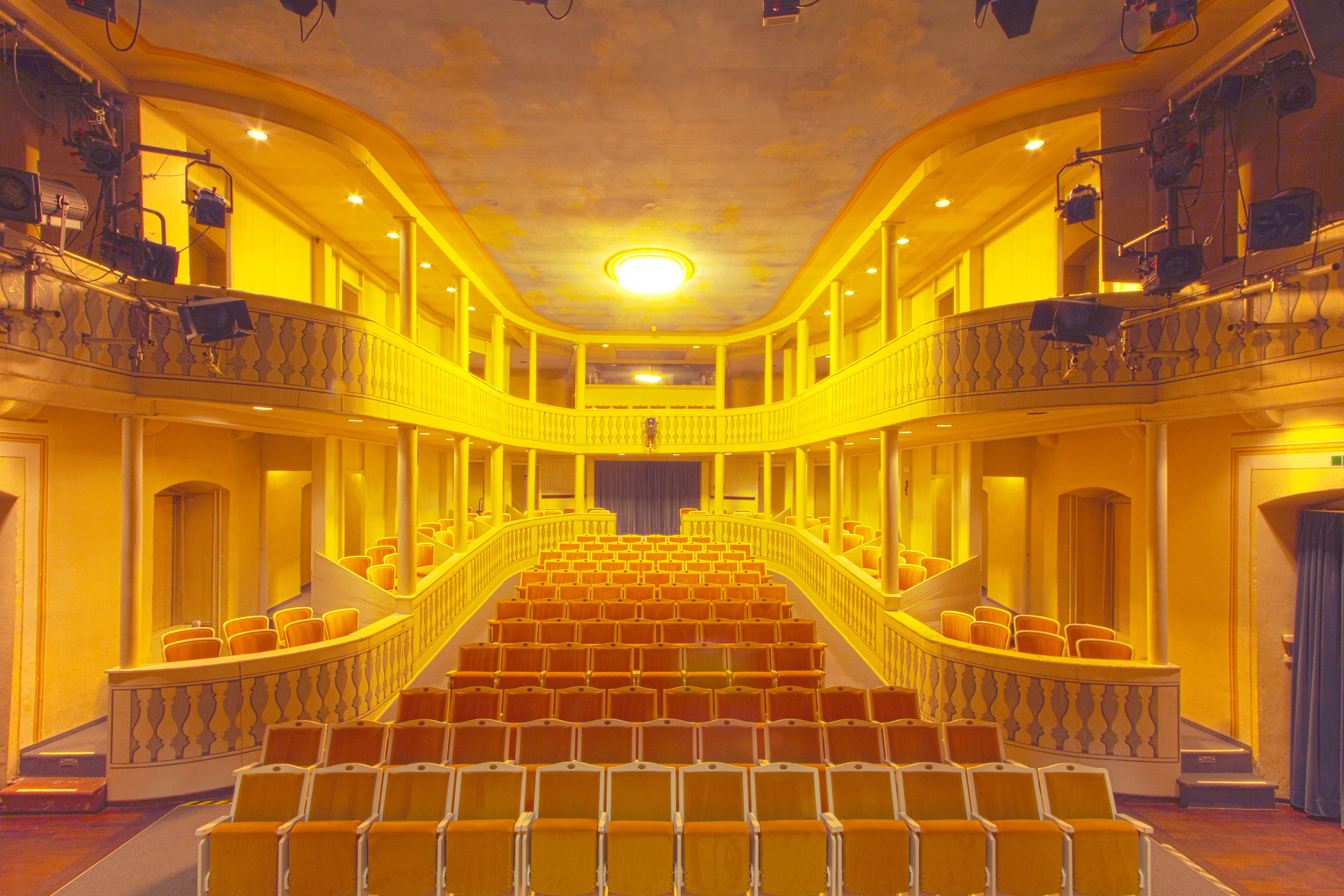 Innenansicht - Blick von der Bühne in den Zuschauerraum. 1781 für Wilhelm von Hessen-Kassel errichtetes Comoedienhaus, Bestandteil der Parkanlage Wilhelmsbad in Hanau. Eines der wenigen historischen Theater in Deutschland, in dem barocke Bühnenmaschinerie und historische Bühnenbilder erhalten sind.